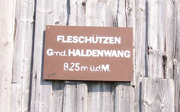 altes Ortsschild von Fleschützen